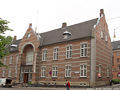 Det andet rådhus i Århus, Denmark blev opført i årene 1856-1857